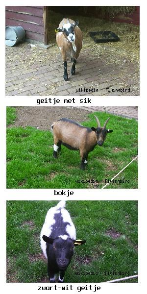 Foto's van geitjes die ik net genomen heb Als iemand betere beschrijvingen heeft voor de foto's, hoor ik dat graag, ik weet zelf bijna niets van geiten af! categorie:afbeelding geit